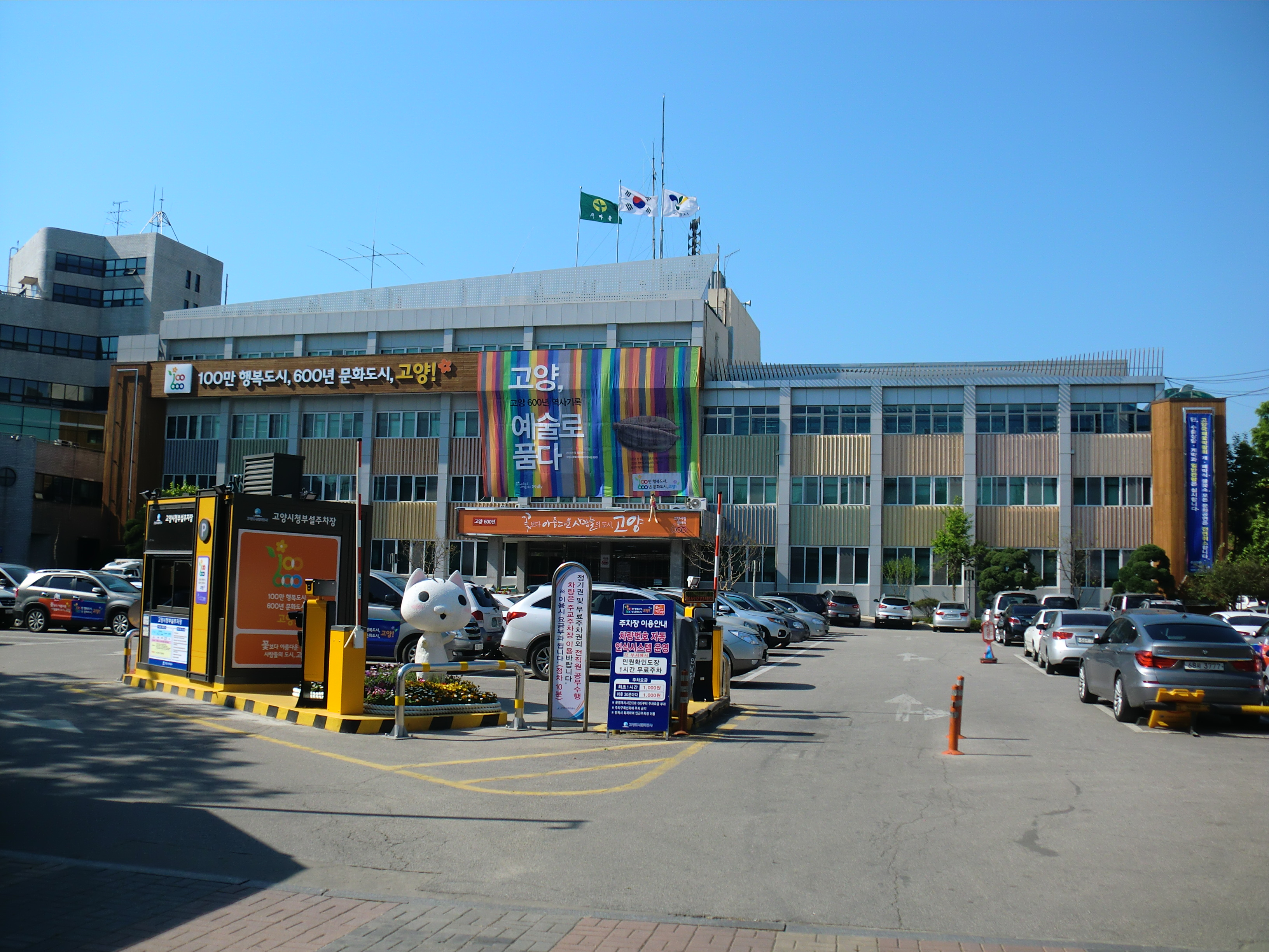 경기도 고양시에 있는 고양시청